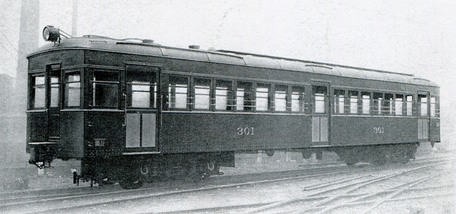 三河鉄道デ300形301号車。製造元の日本車輌製造本店にて落成時に撮影された形式写真。